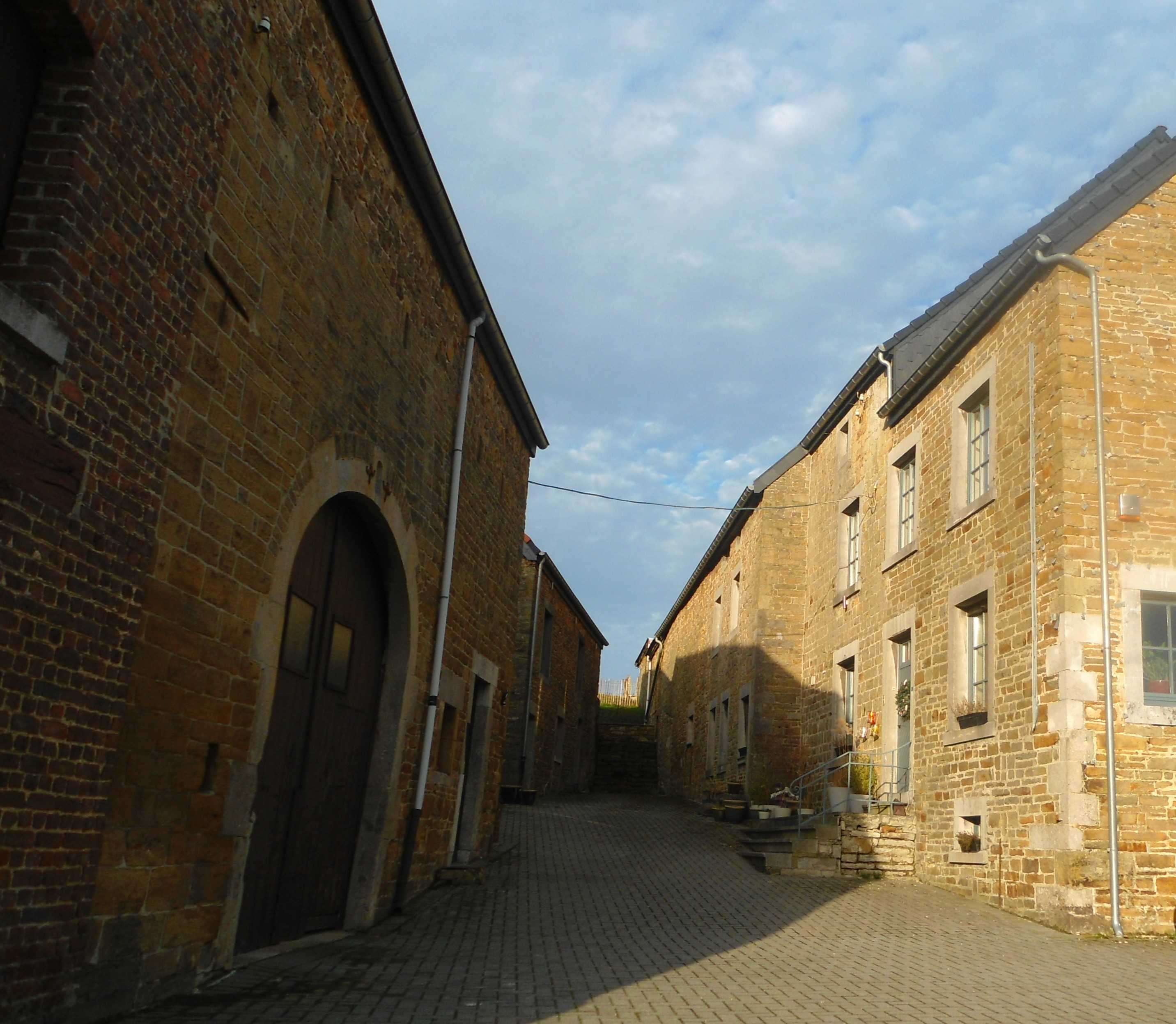 Cour à Rouvreux Sprimont